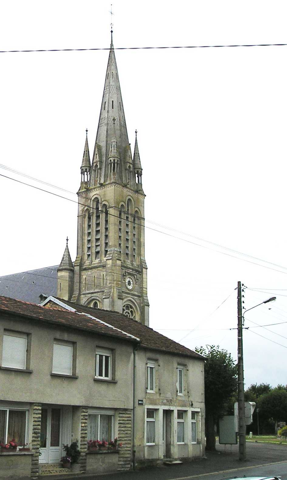 Kirche Notre Dame in Fayl-la-Fôret